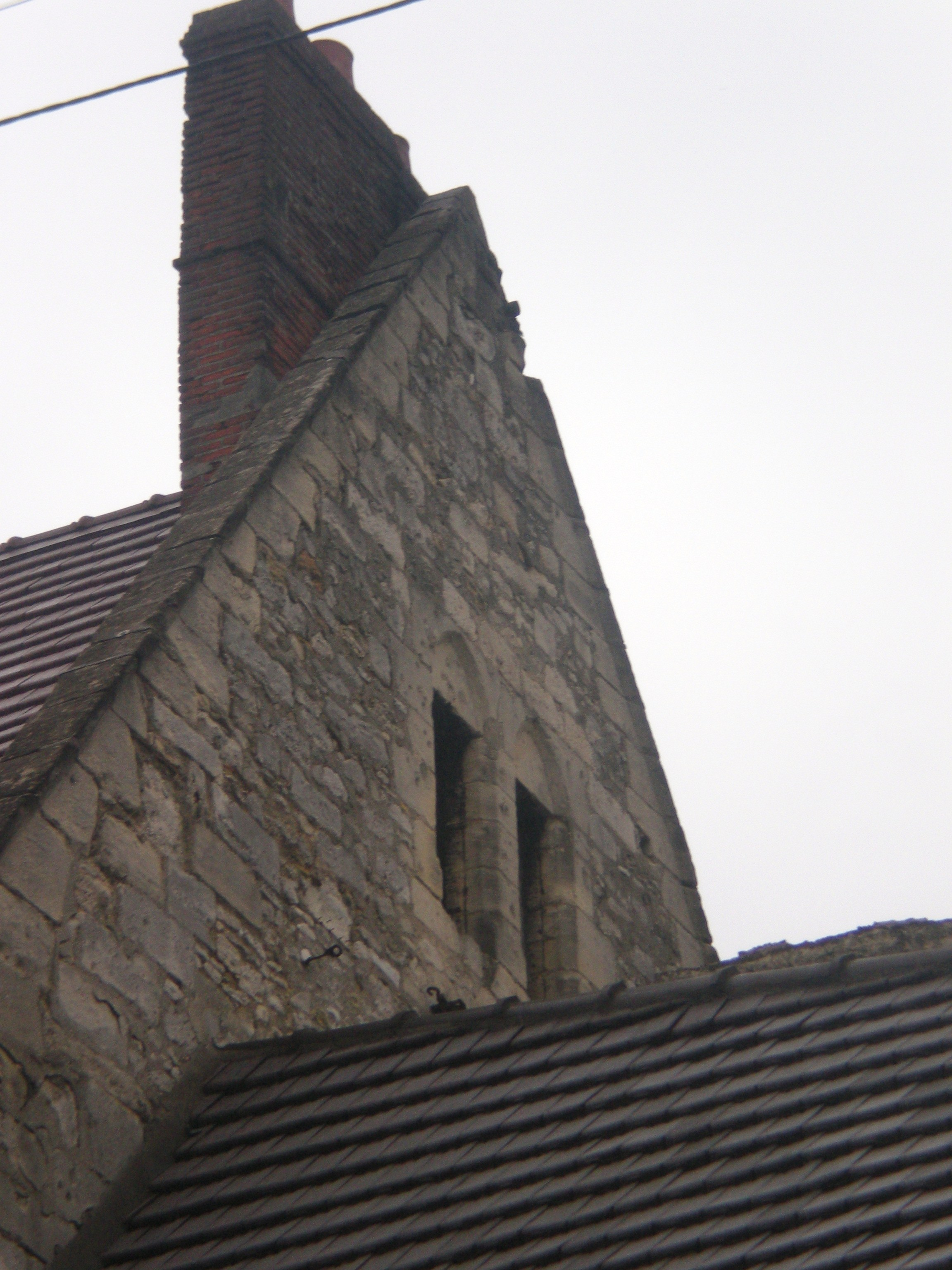 fenêtres gothiques bouchées de la maison de froidmont (clermont, oise)